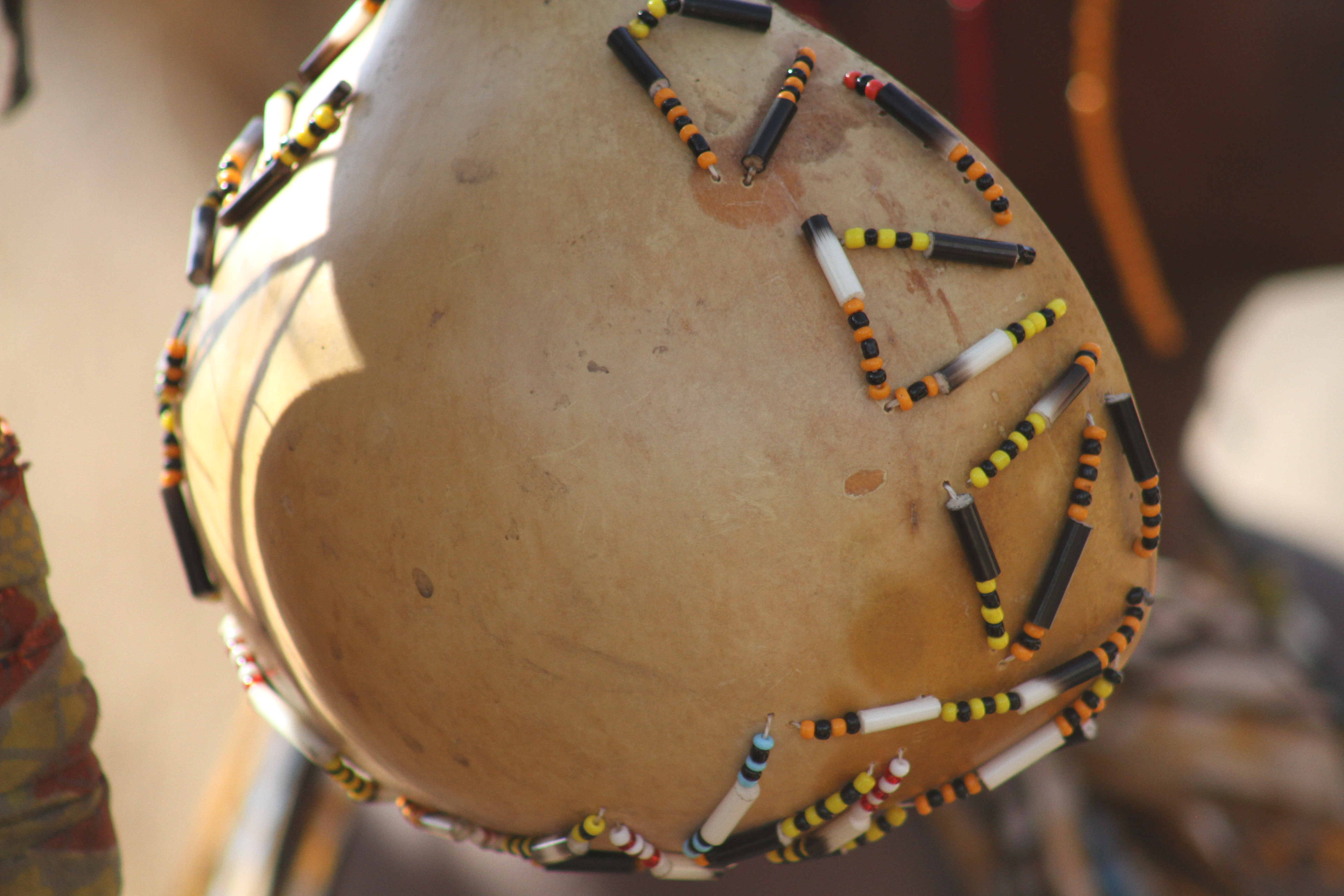 Kiswahili: Kifaa kinachtotumiwa na wa-hadzabe katika kunywea na kulia vyakula ama pombe. This is an image of Cultural Fashion or Adornment from Tanzania